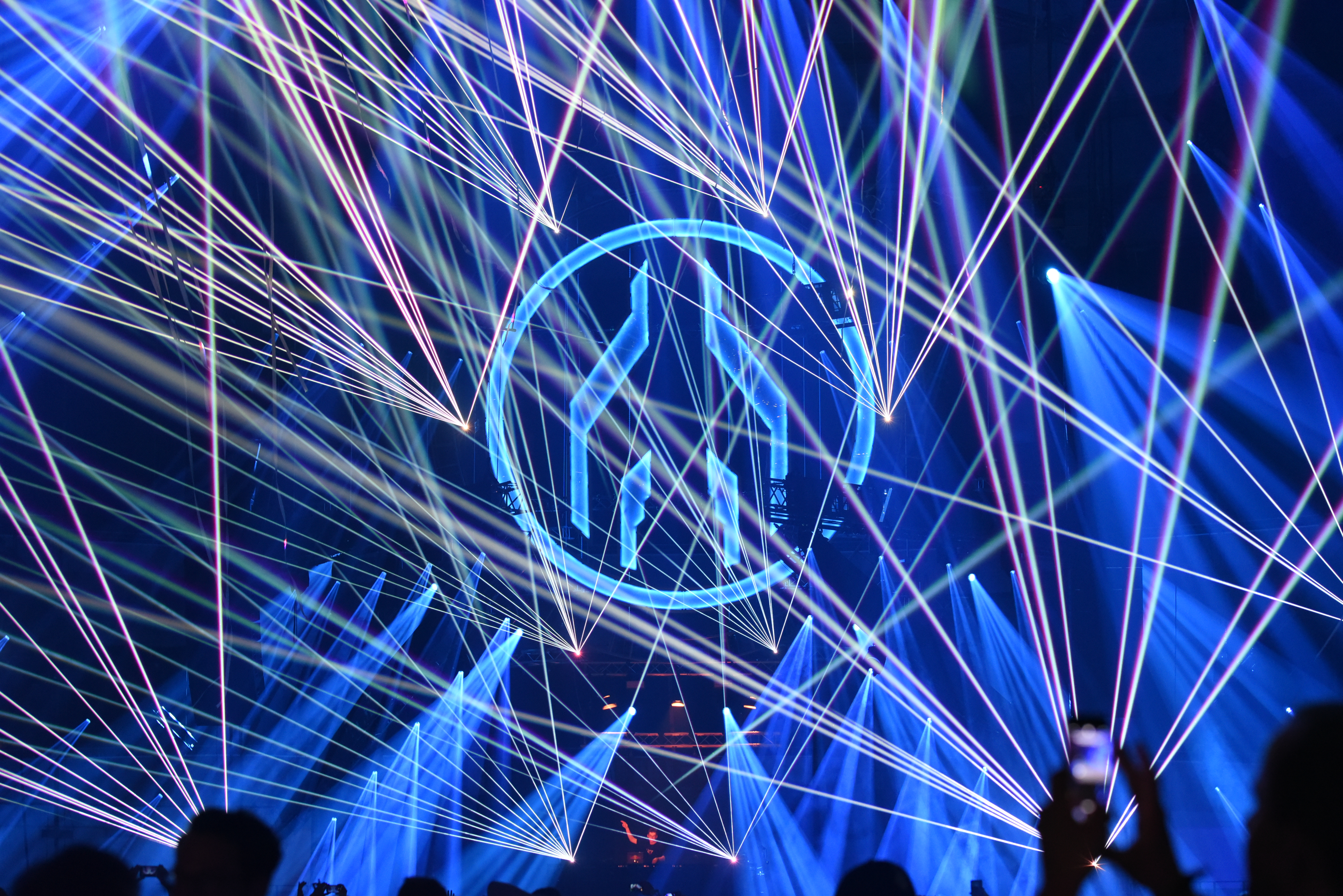 Mayday 2019 Lasershow während Lost Frequencies